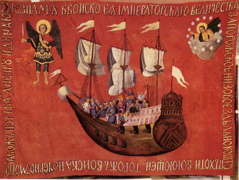 Обратная сторона казацкого морского флага, дарованного Сечи императрицей Анной Иоанновной в 1734 г. На лицевой стороне флага изображен черный двуглавый орел со звездами (копия, Львовский исторический музей, оригинал находится в Эрмитаже).